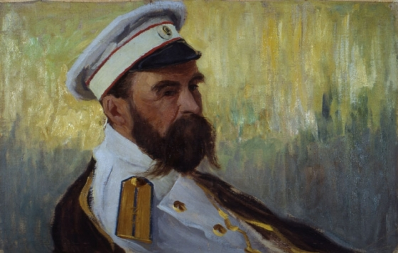 Адамс Алкснис (1864-1897). Портрет военного врача.